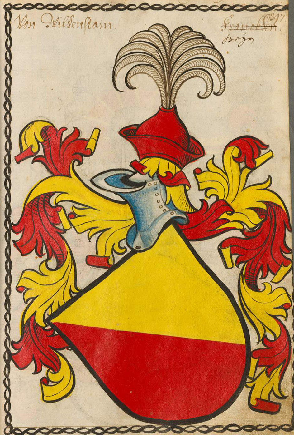 Scheibler'sches Wappenbuch , älterer Teil Bayern Wildenstein